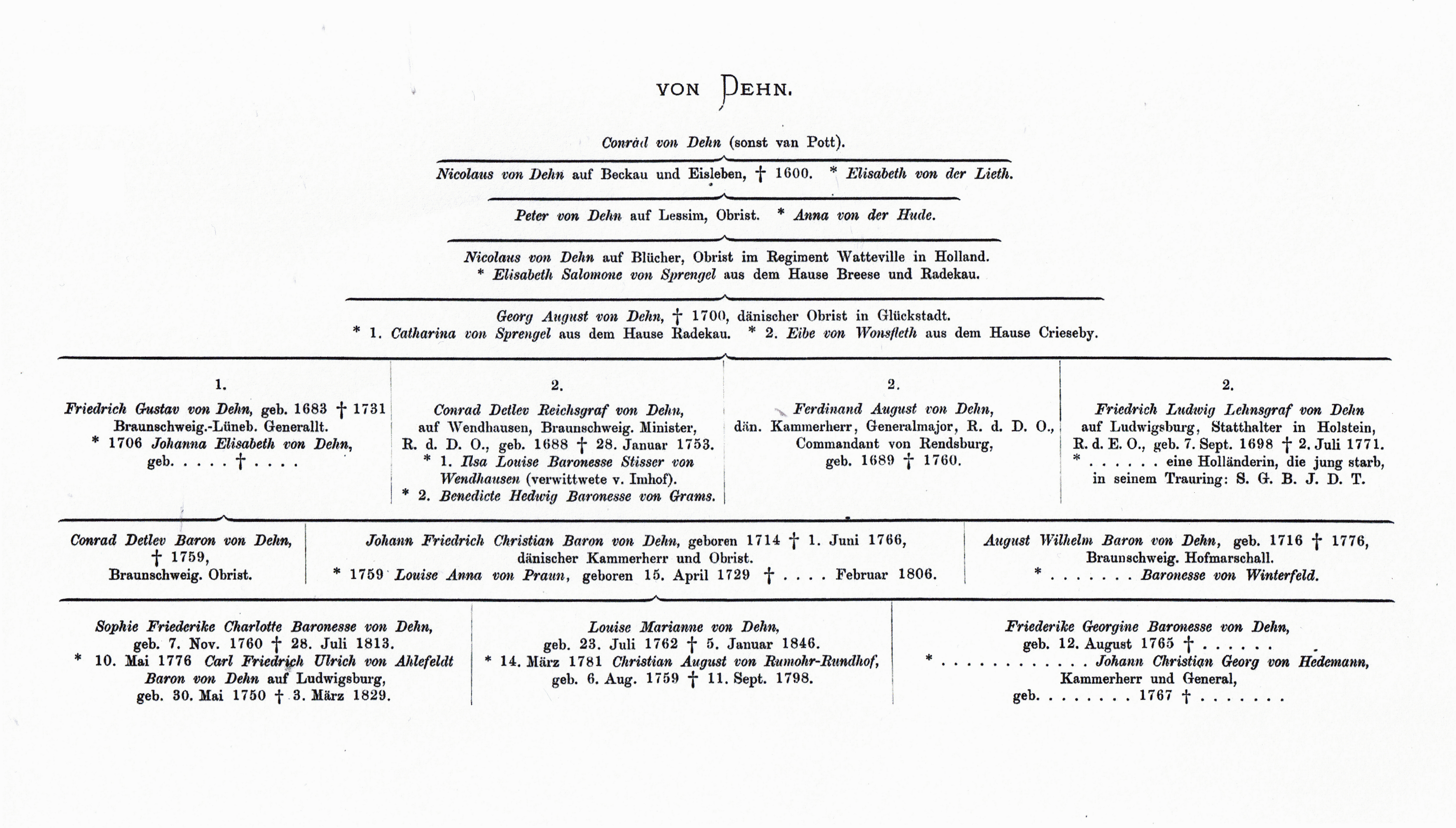 Stammtalfel der Adelsfamilie von Dehn (ein Zweig der Adelsfamilie von Ahlefeldt) aus dem Jahr 1869